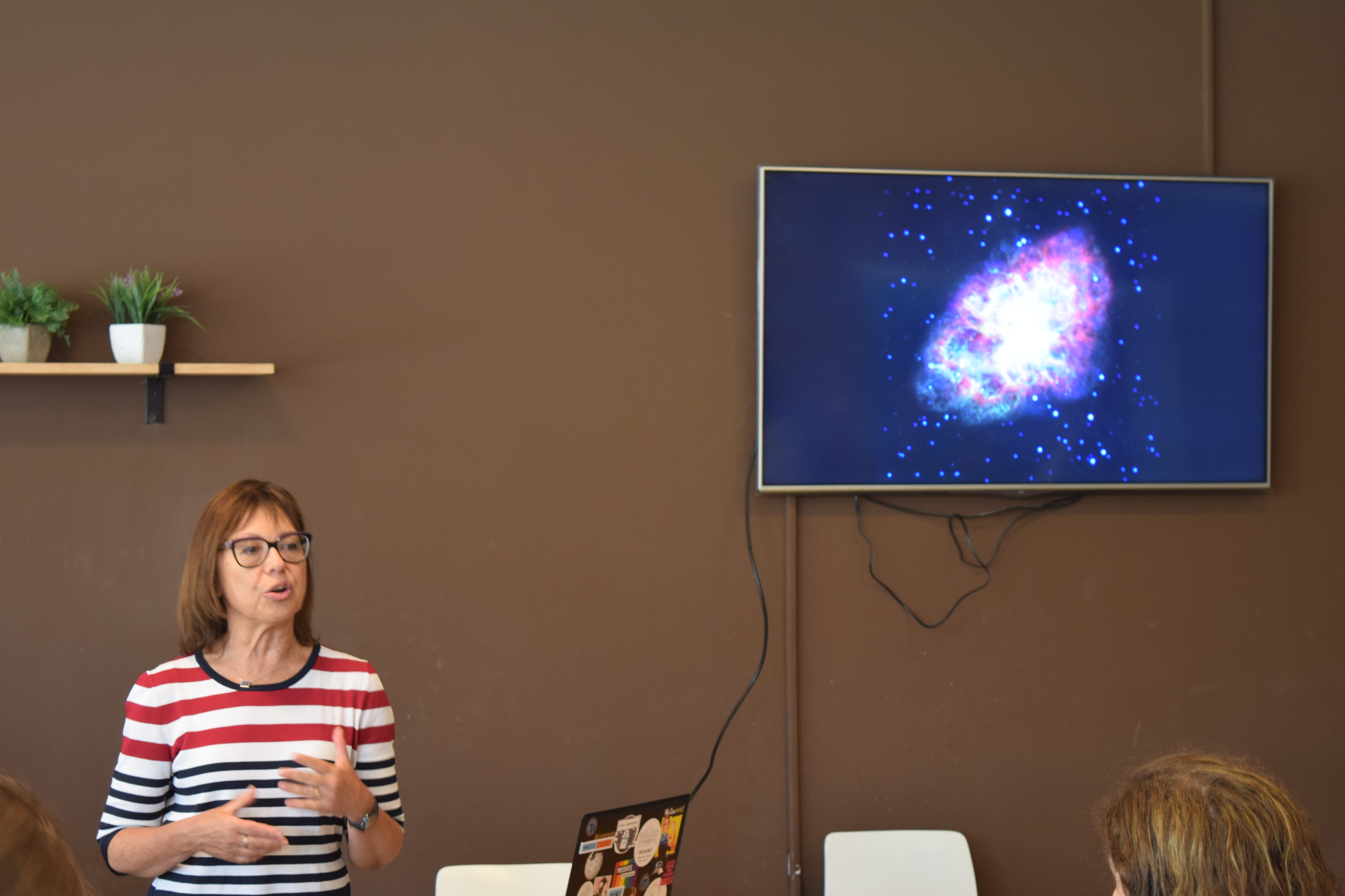 Editatón de científicas y tecnólogas argentinas, en el Polo Científico y Tecnológico. Gloria M. Dubner.